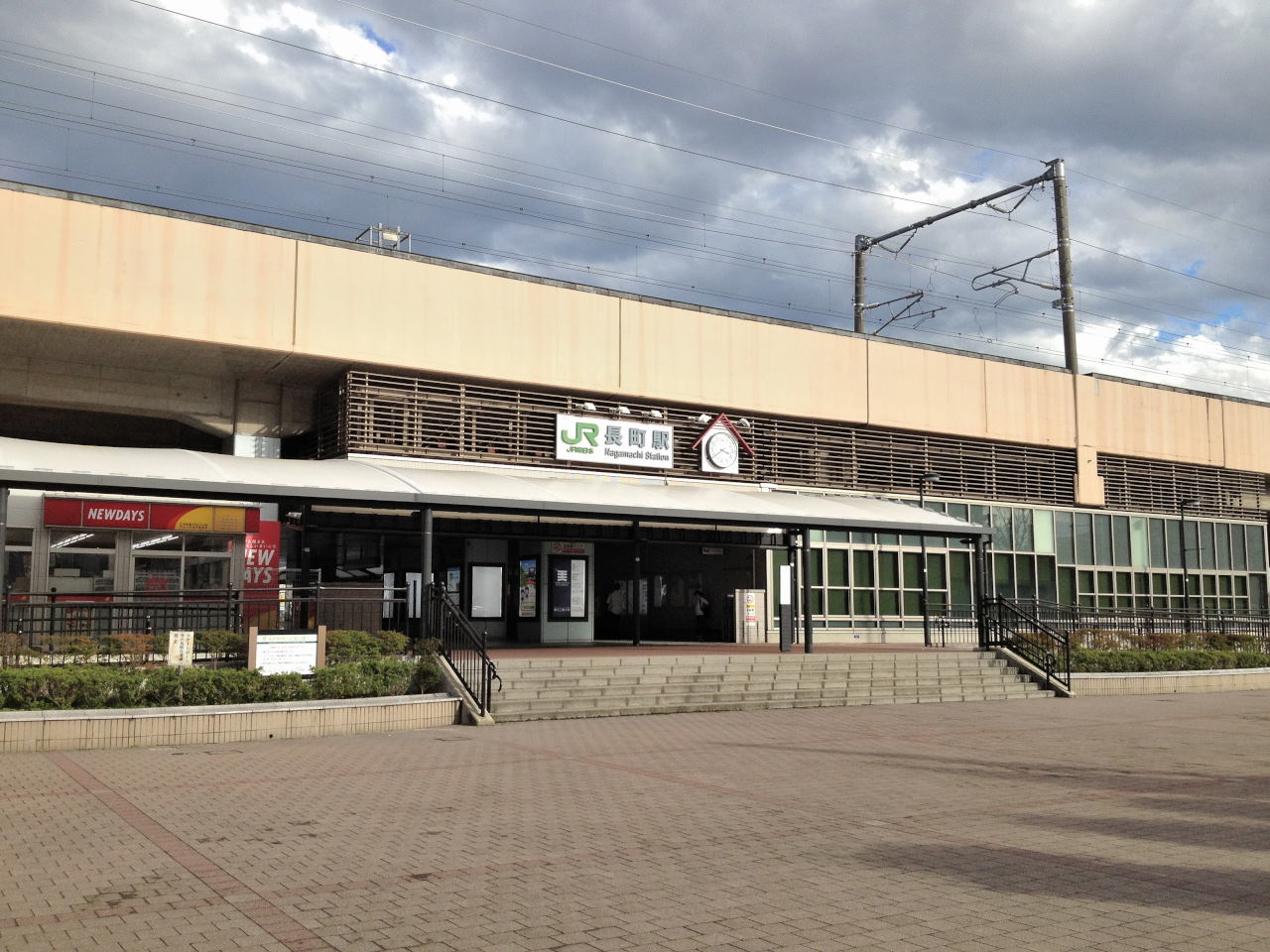 JR東日本 長町駅 西口2